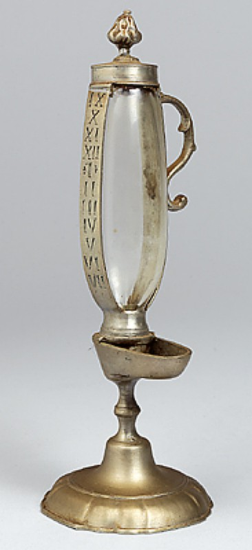 Baroque oil-lamp clock